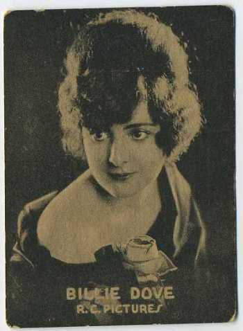 Billie Dove - Susini y Bock Ovalados Tobacco Card